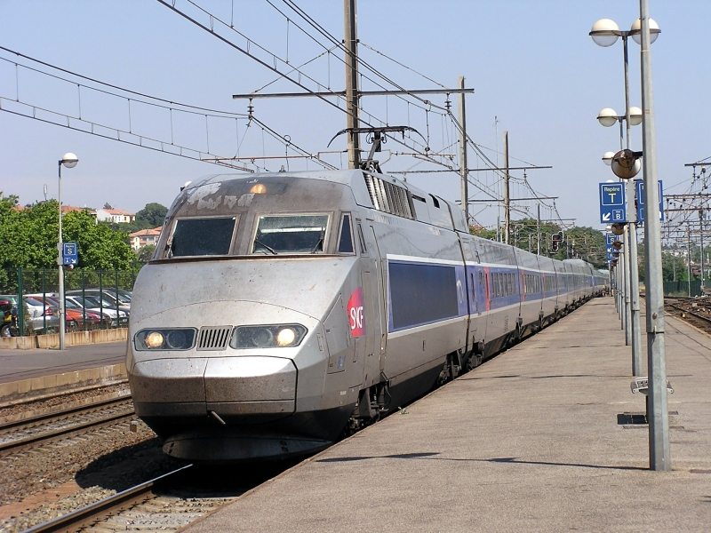 TGV-Resseau entering to Bèziers (France)